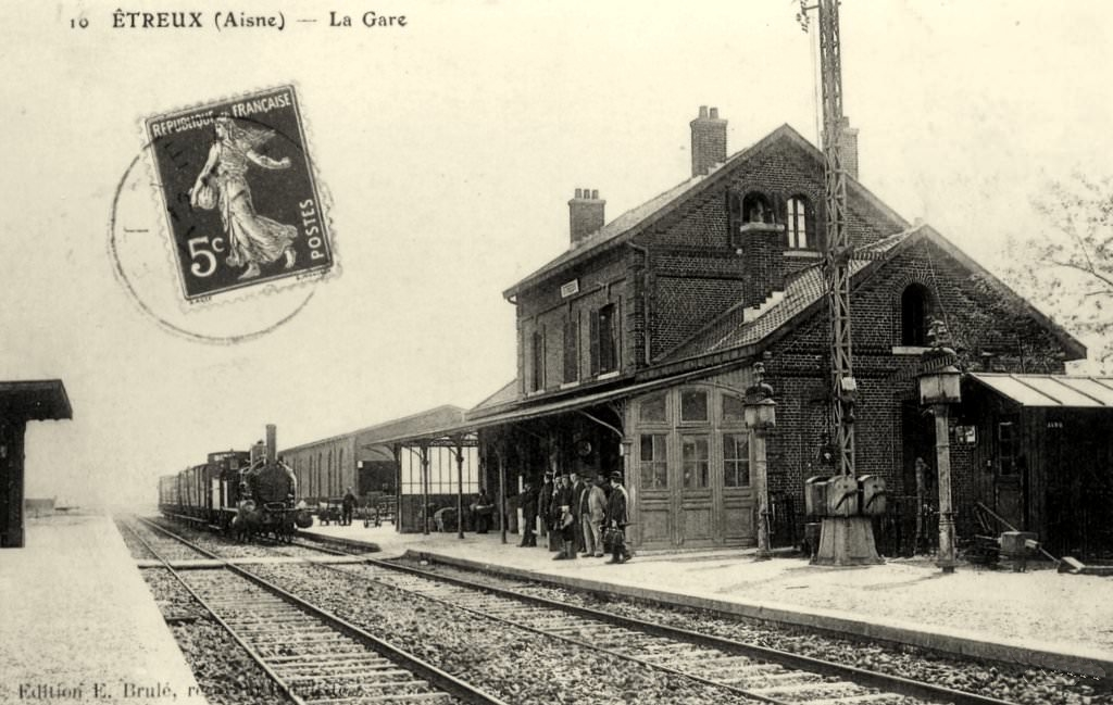 Carte postale de l'ancienne gare